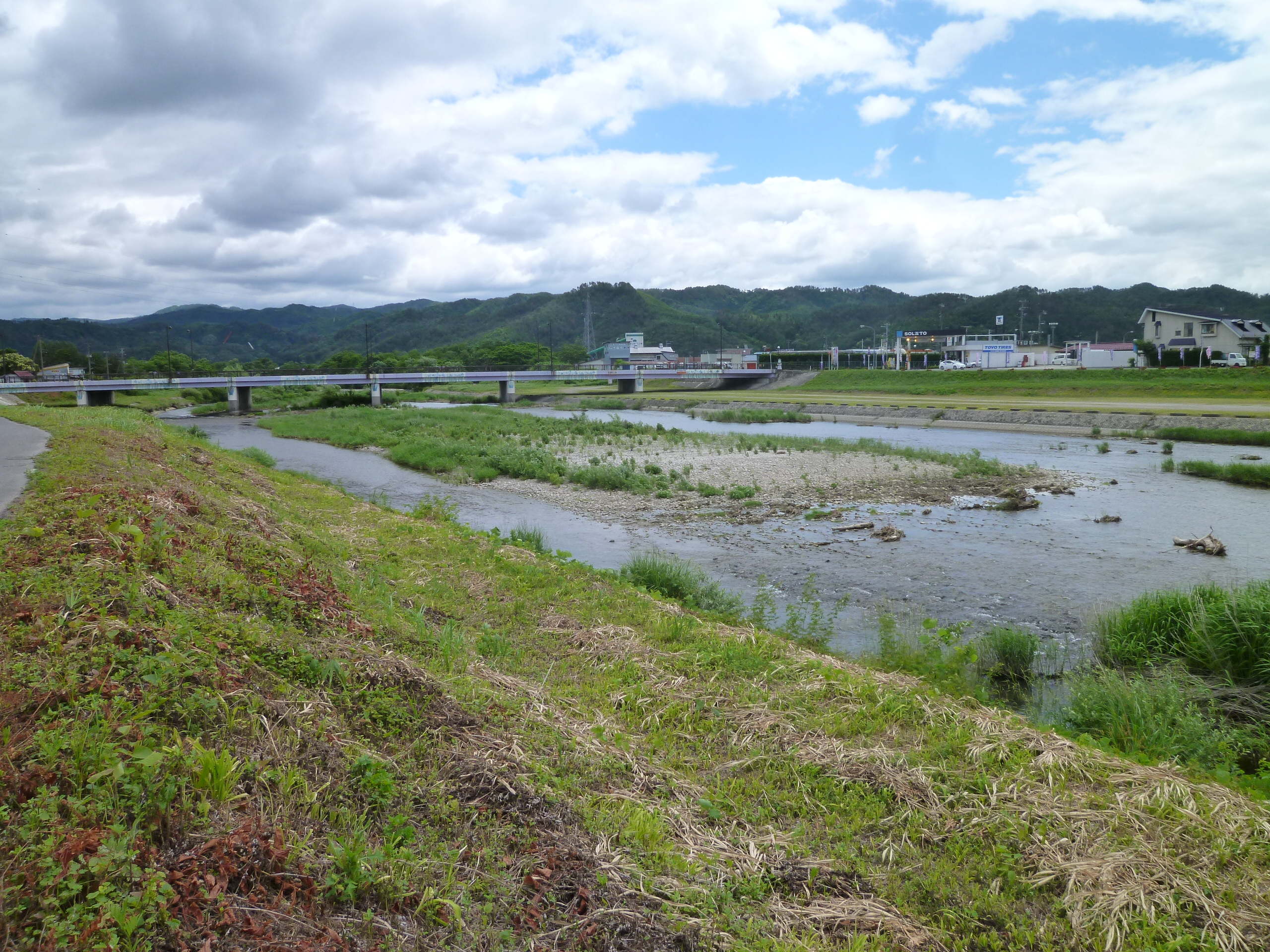 置賜野川。 山形県長井市成田より撮影。左岸から下流方向。 橋梁は山形県道9号長井大江線の野川橋。